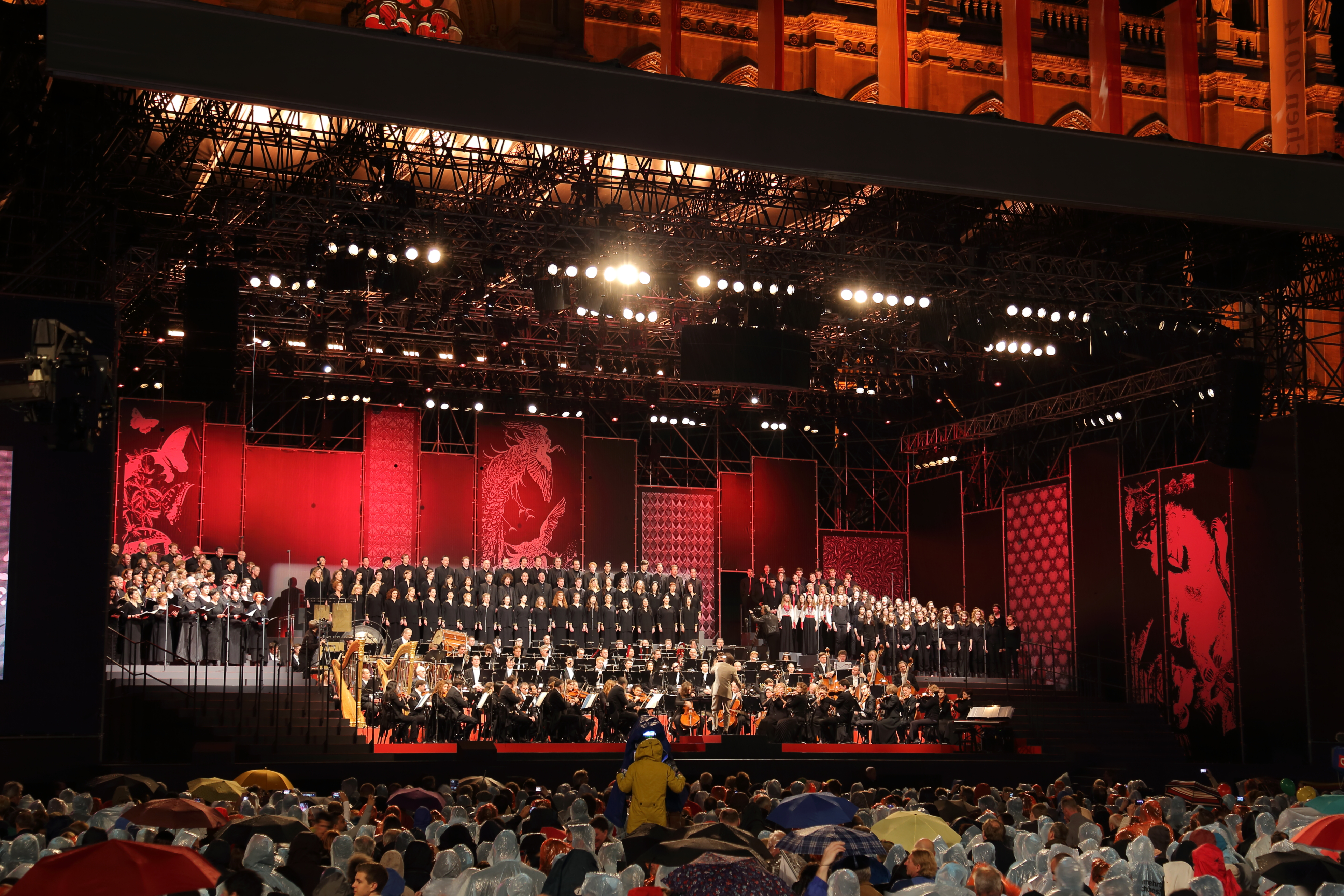 Eröffnungsveranstaltung der Wiener Festwochen 2014 am 9. Mai mit dem Arnold Schoenberg Chor und dem Radio-Symphonieorchester Wien unter der Leitung von Cornelius Meister. An Gastchören nahmen teil: BNR Mixed Coir aus Bulgarien, Concordia Discors aus Kroatien, coro siamo aus Österreich, Euga aus Finnland, La Maîtrise de Paris aus Frankreich, Liepaites aus Litauen, Sola aus Lettland und Vox Bona aus Deutschland. Die Moderatoren Cornelius Obonya und Alice Tumler führten durch die Veranstaltung.